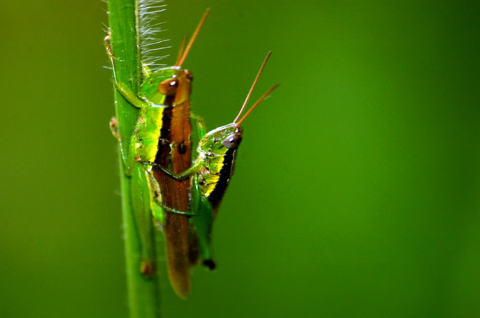 Belalang sedang kawin, belalang hijau ini dari Indonesia